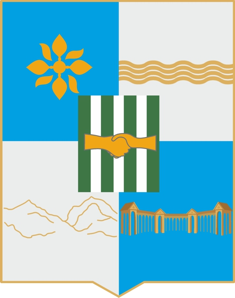 Герб, Гагры